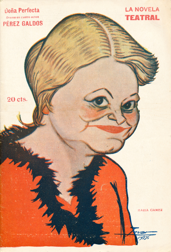 Caricatura de María Gámez.